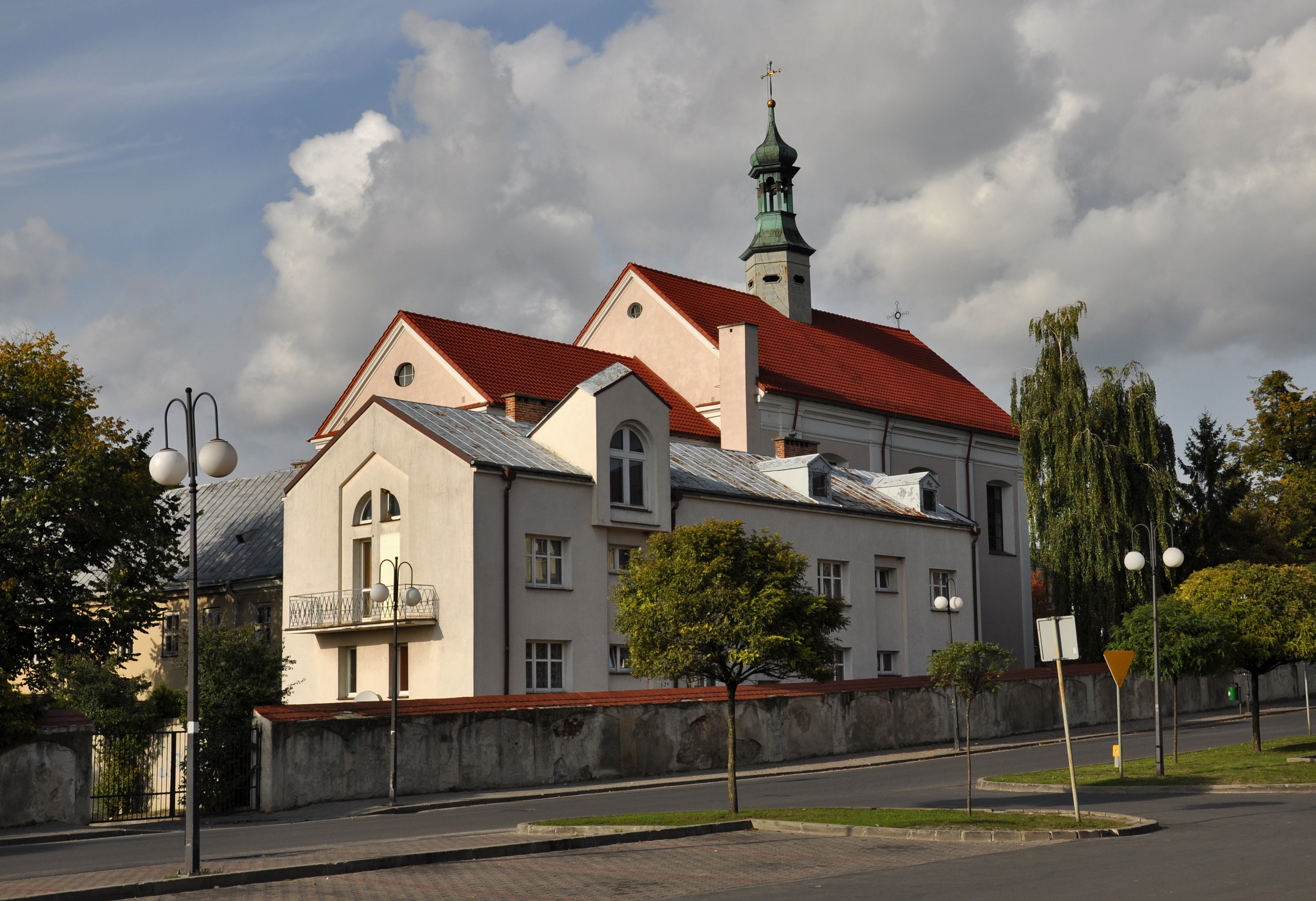 Chełm, kościół p.w. św. Andrzeja, 1737-1750